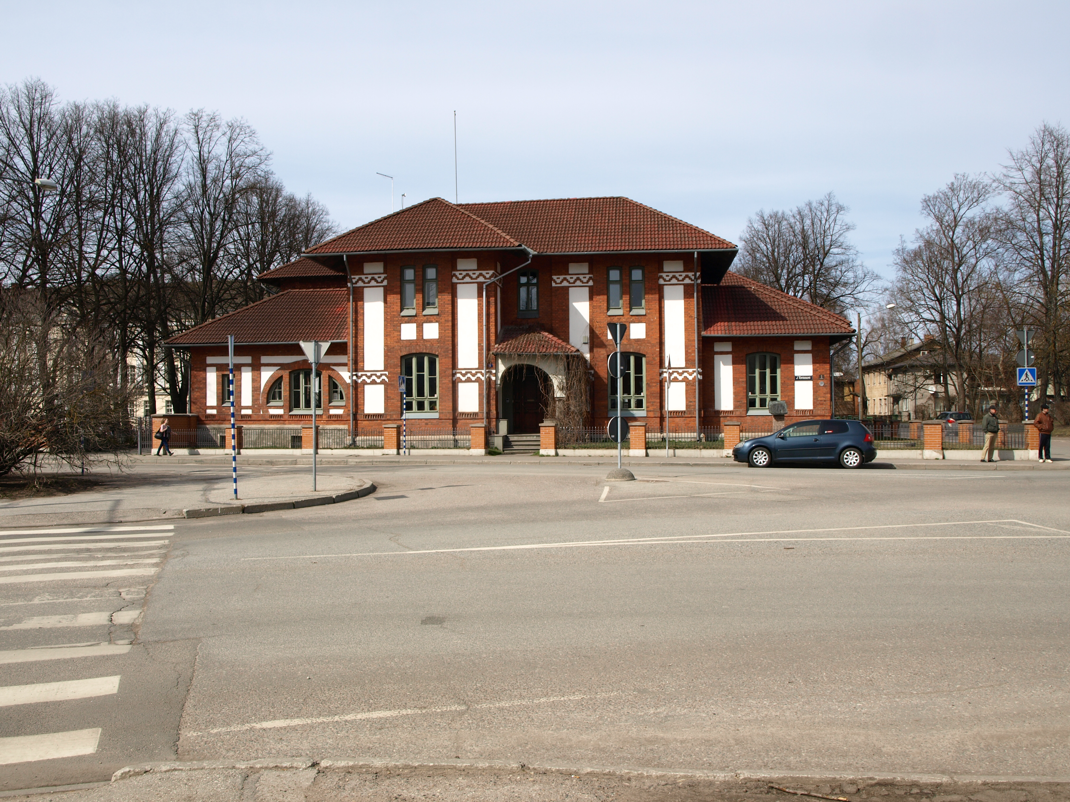 Eesti Üliõpilaste Seltsi hoone Tartus, J. Tõnissoni 1, 1901. a